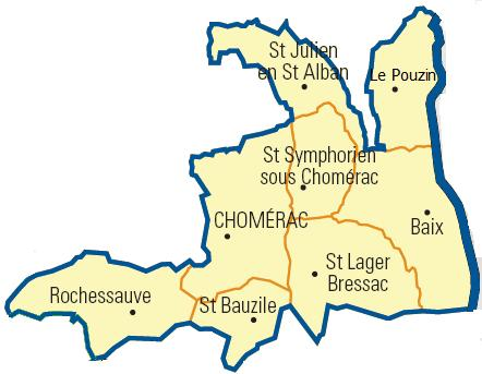 Carte détaillée des communes du canton (Ardèche)